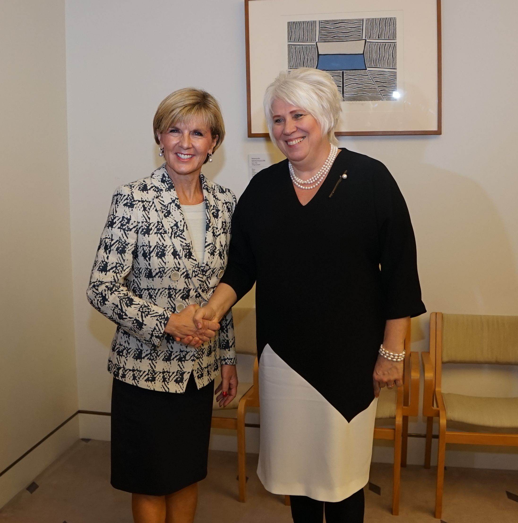 Välisminister Marina Kaljurand kohtus Austraalia välisministri Julie Bishopiga